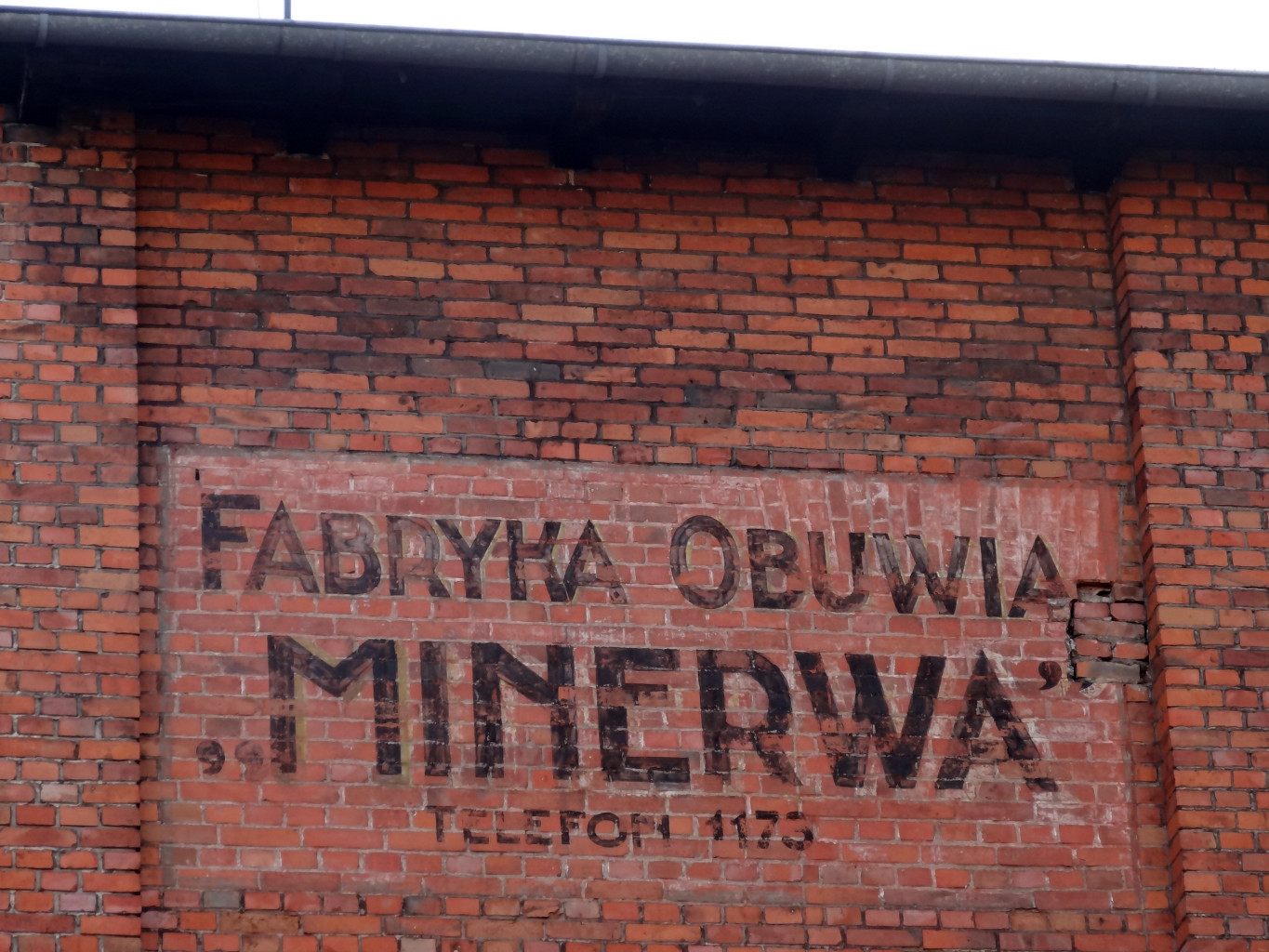 Ulica Bolesława Chrobrego w Bydgoszczy